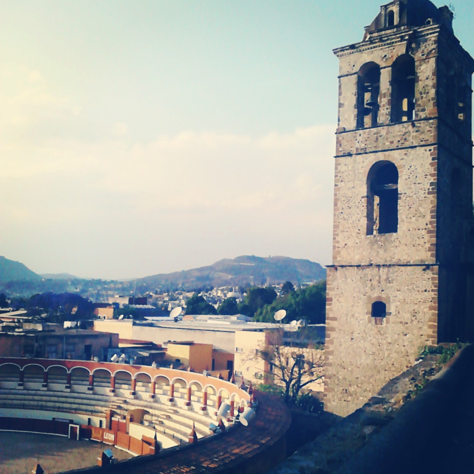 La Plaza de Toros Jorge el "Ranchero" Aguilar se encuentra ubicada en el centro histórico de la ciudad de Tlaxcala.